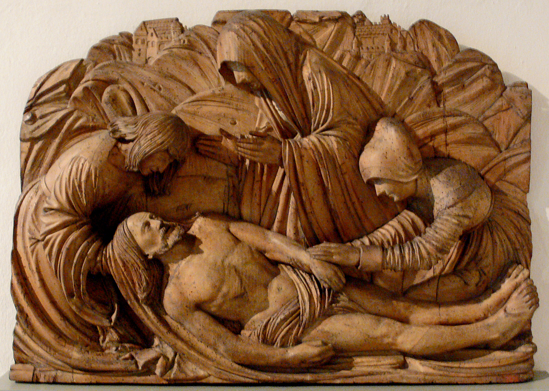 Meister von Ottobeuren: Beweinung Christi, um 1520 Bayerisches Nationalmuseum München